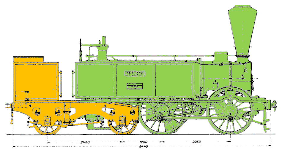 Schnellzug-Lokomotive SCB Eb 2/4 System Engerth der Schweizerischen Centralbahn, gebaut 1857 von der Maschinenfabrik von Emil Kessler in Esslingen.grün: Lokomotiveorange: Stütztender